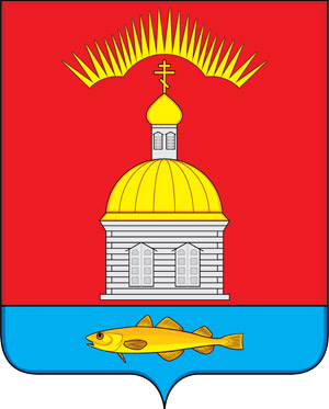 Герб Печенги, Мурманская область, Россия